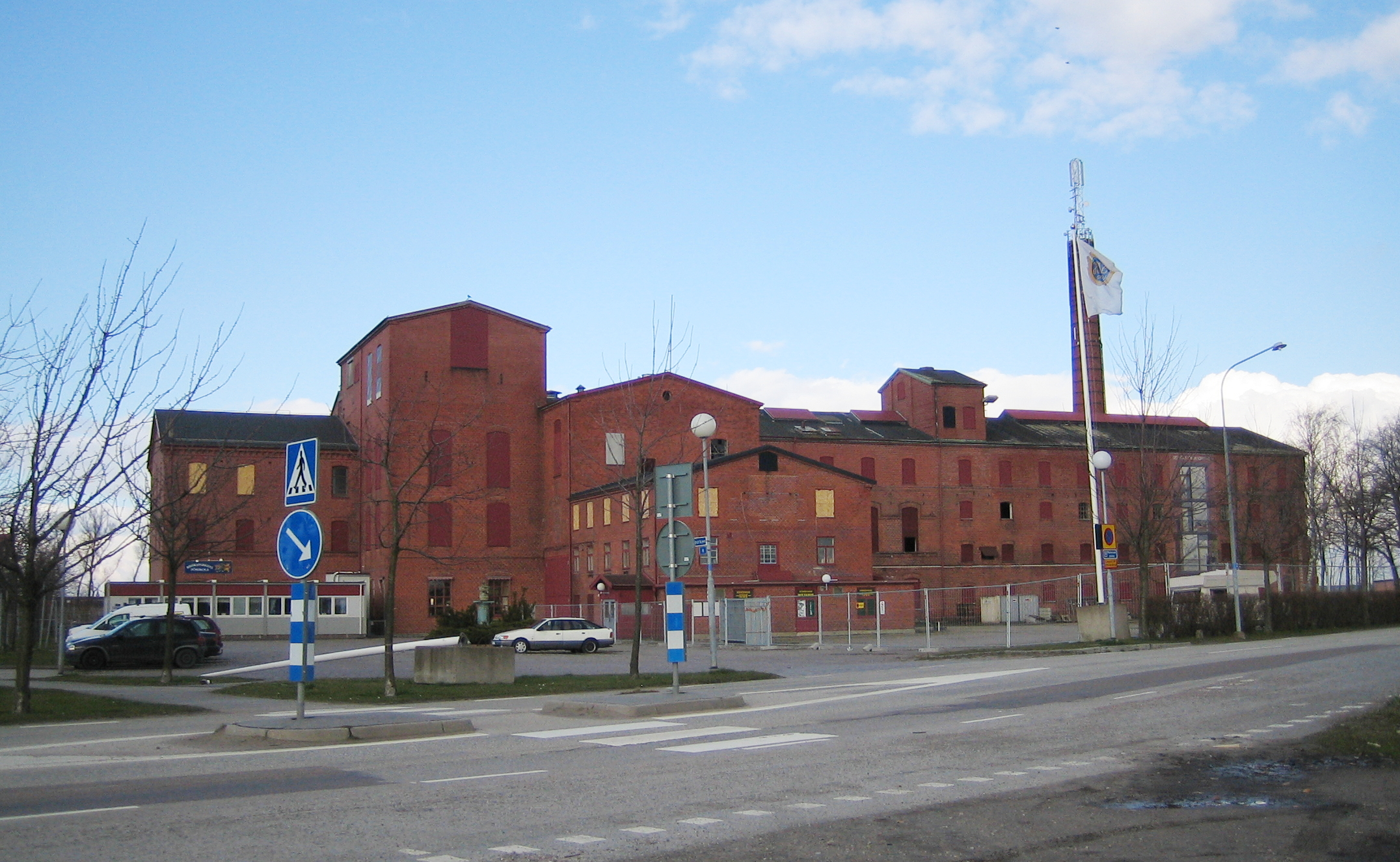 Former sugar plant in Hököpinge, Malmö, Sweden